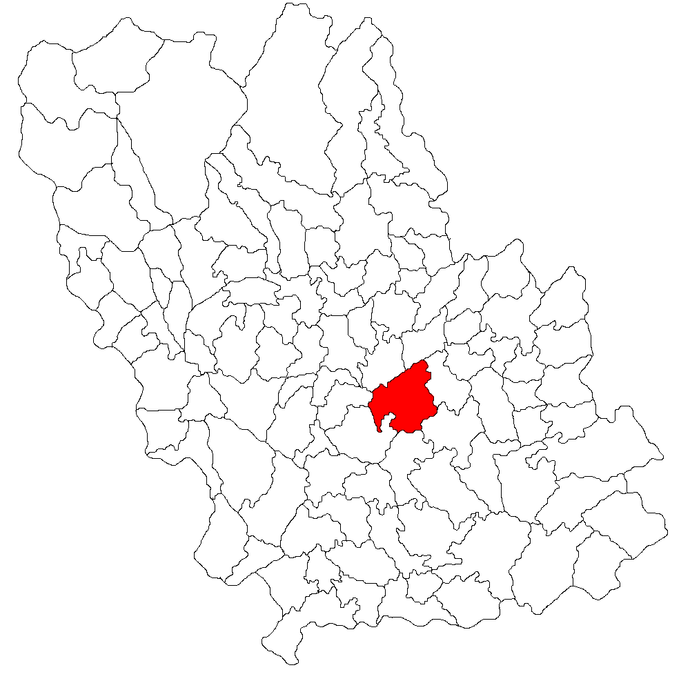 Categorie:Hărţi ale judeţului Prahova